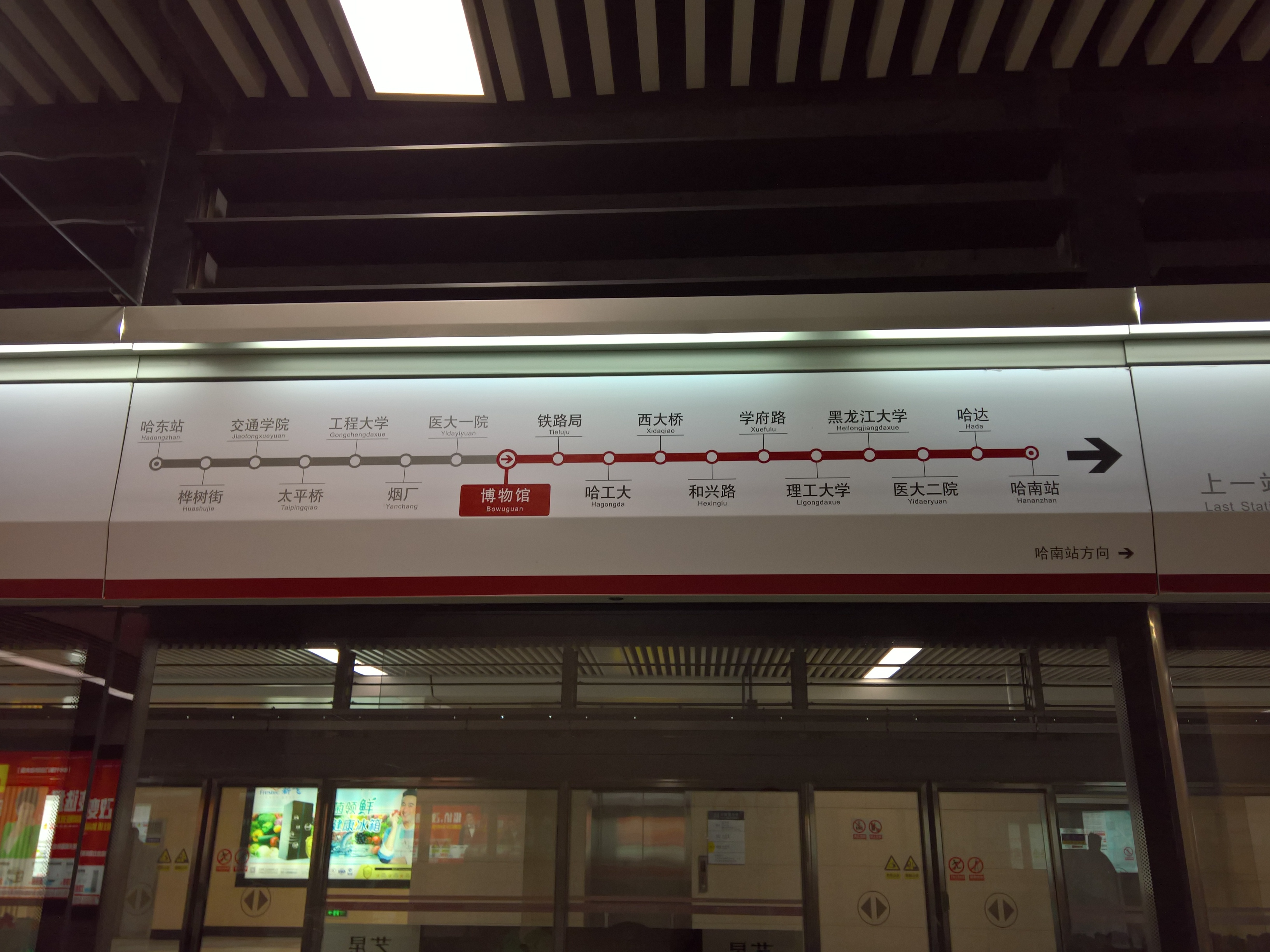 哈尔滨地铁1号线屏蔽门吊板